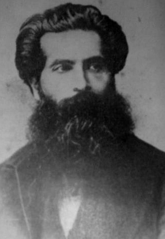 Leandro Alem en 1876